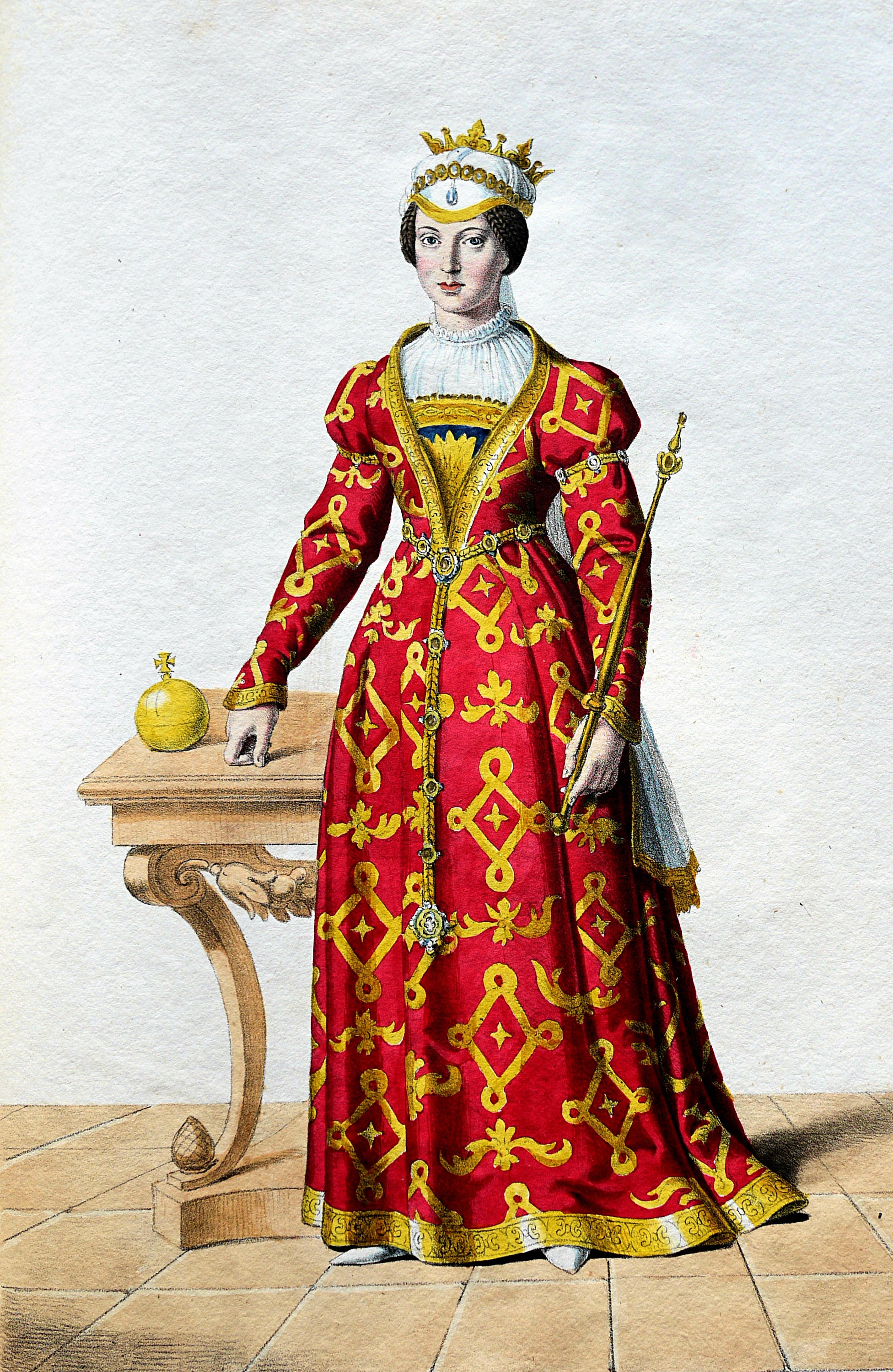 Maria I. (1370-1395), Königin von Ungarn etc (1382-1395). Lithographie von Josef Kriehuber nach einer Zeichnung von Moritz von Schwind aus Ungerns Erste Heerführer Herzoge und Koenige In einer Reihe von Bildnissen von Bela bis auf Seine Majestät Franz I. Kaiser Von Österreich König Von Ungern &c., &c. Wien : Lithographisches Institut ;ca. 1828